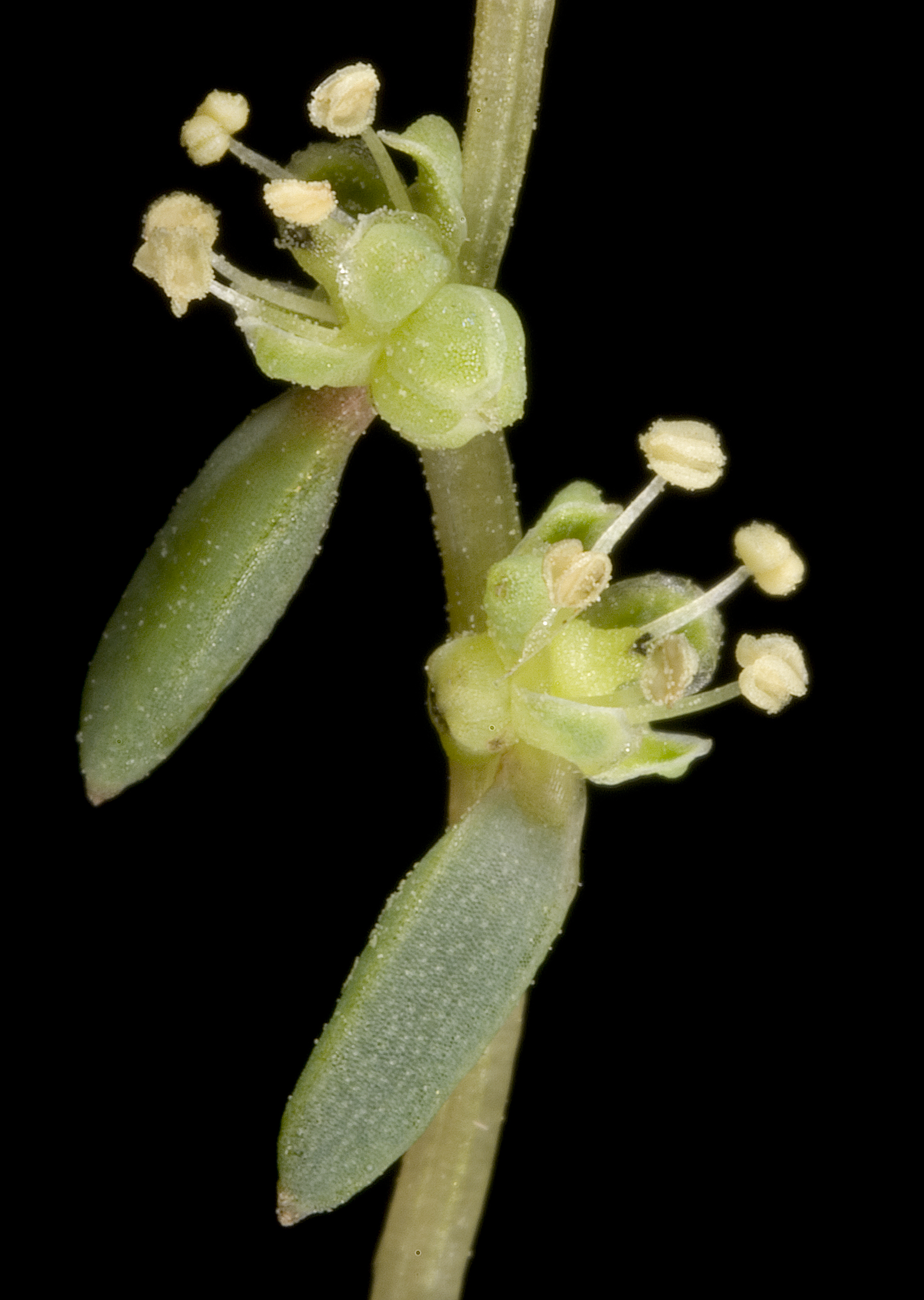 KRT3220